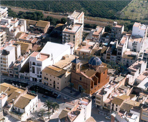 Església de Sant Tomàs de Villanueva, a Benicàssim (Plana Alta)